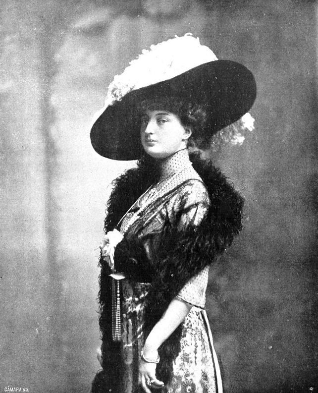 Retrato de Doña Luisa de Orleans, obra del fotógrafo Christian Franzen, recogido en la revista española Mundo gráfico.